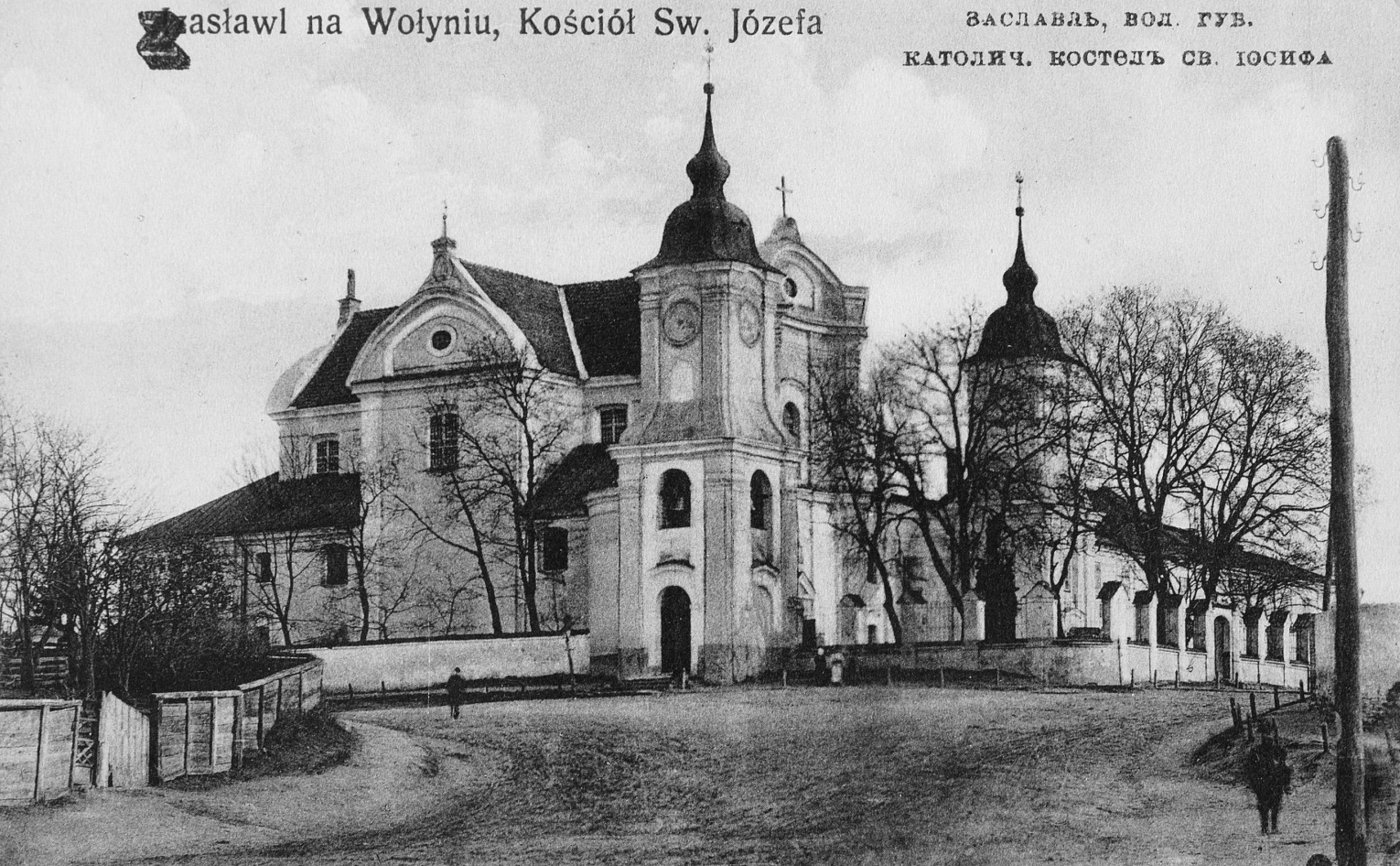 Поштівка. "Заслав на Волині. Костел Святого Йосипа". №4. Вид. В. Чарнецького.